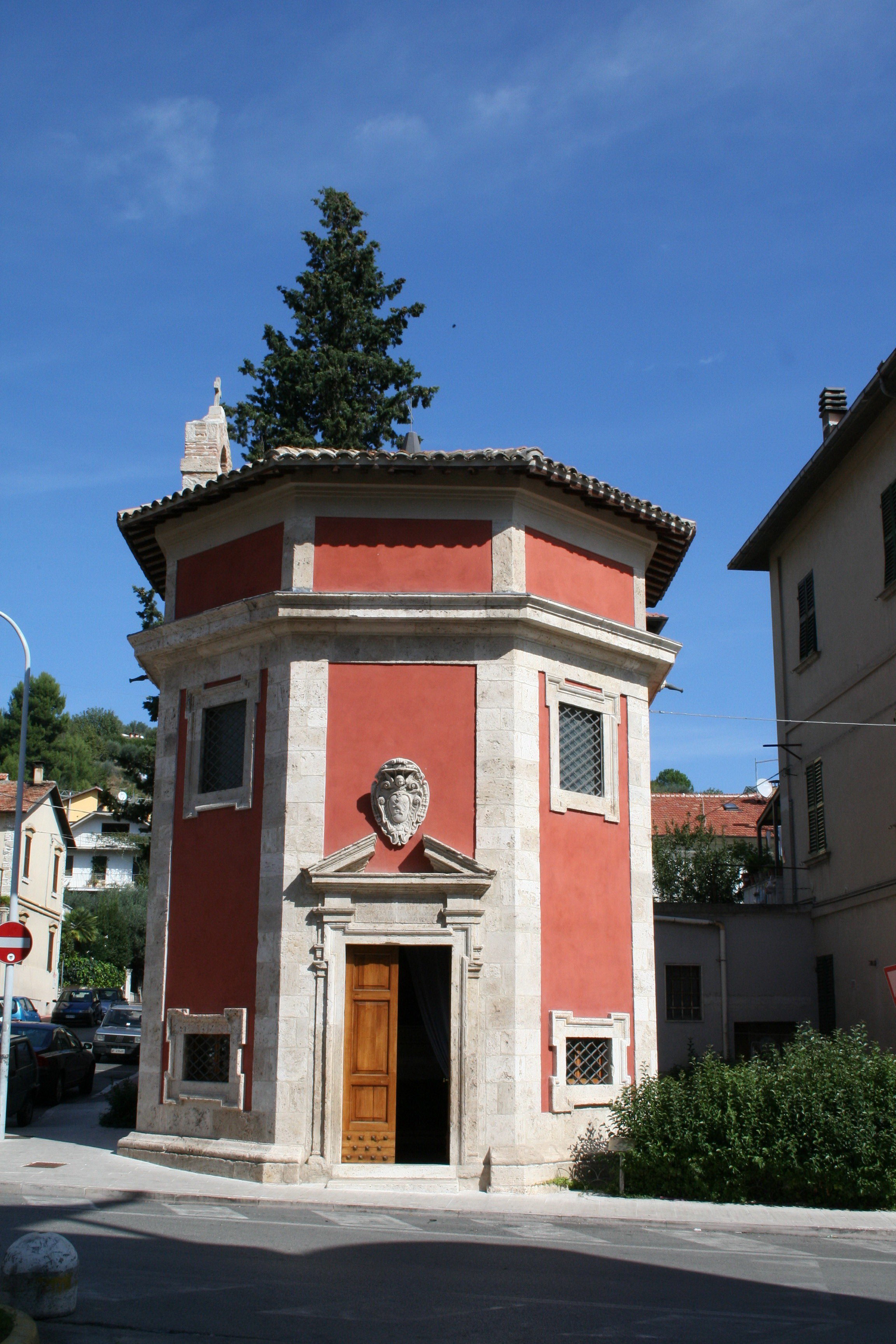 Description: Tempietto Sant’Emidio Rosso, ottobre 2006 Source: proprio scatto Date: 2006-10-01 Author: Sibilla.io Permission: "Utilizzo concesso" This file is licensed under Creative Commons Attribution 3.0 License